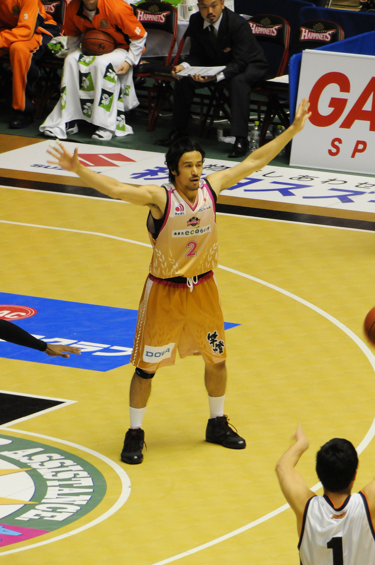 秋田ノーザンハピネッツ、水町亮介選手。秋田県立体育館で。